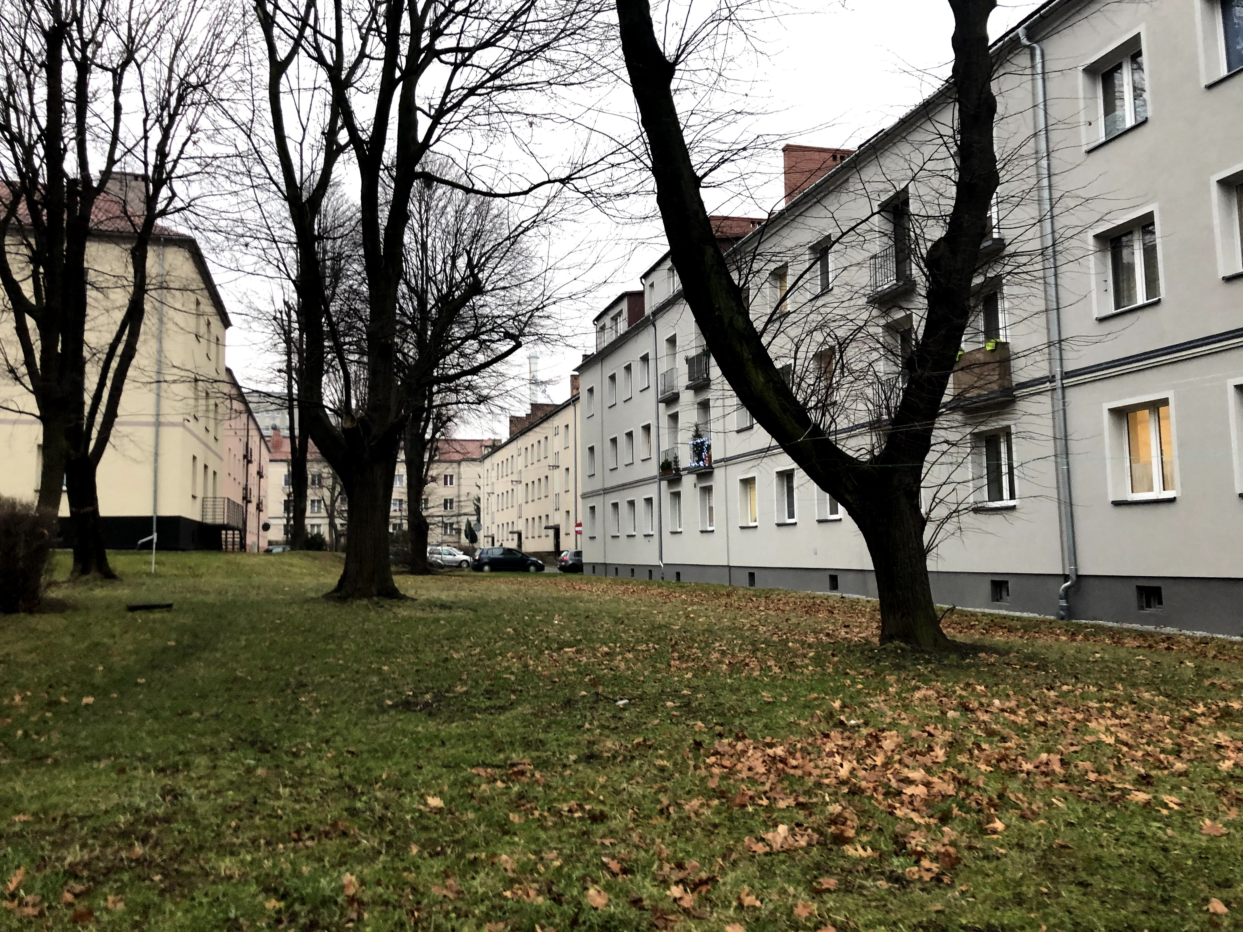 Osiedle Grunwaldzkie w Bielsku-Białej, widok z ulicy Młodości